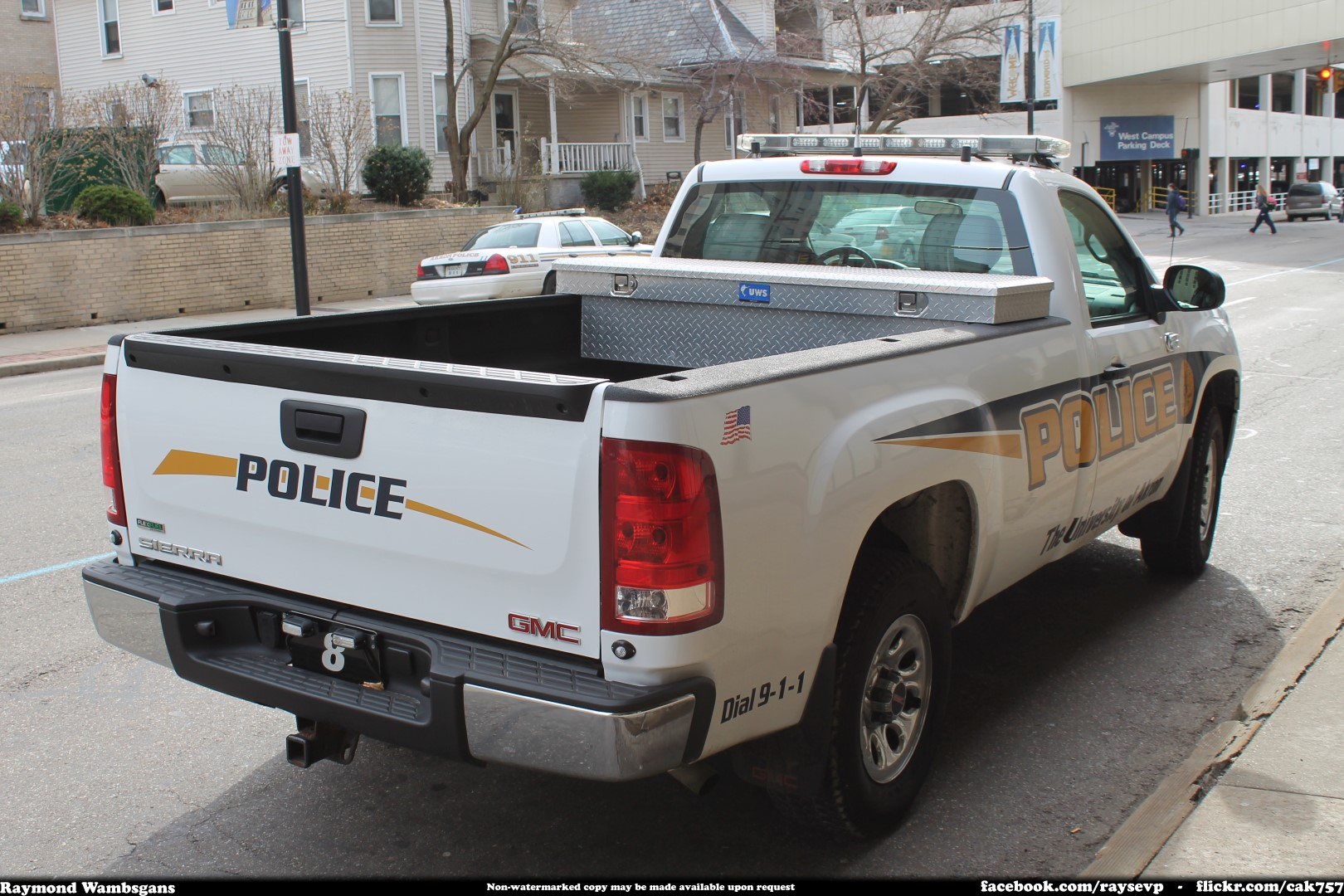 UAPD GMC Sierra